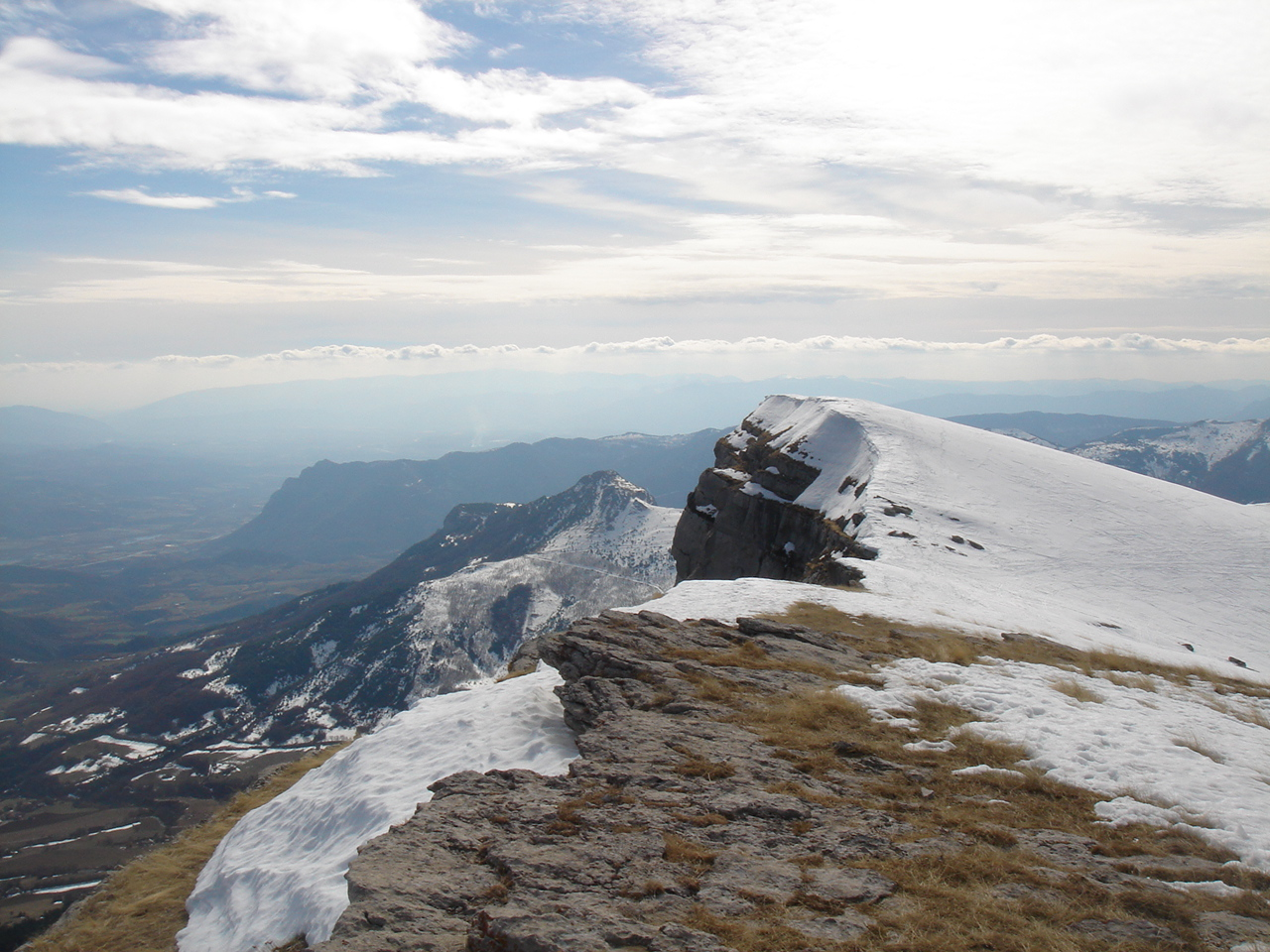 La petite Céüze vue de la grande !